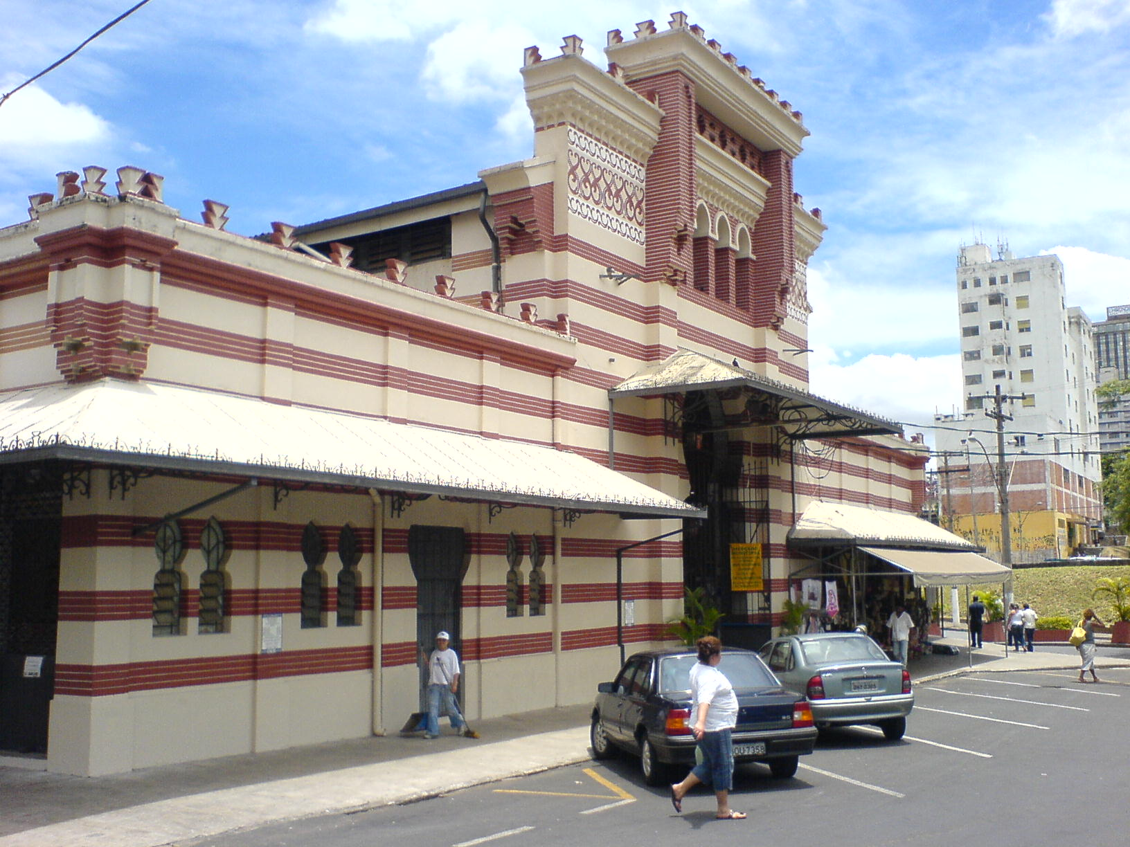 Atras do Mercadão